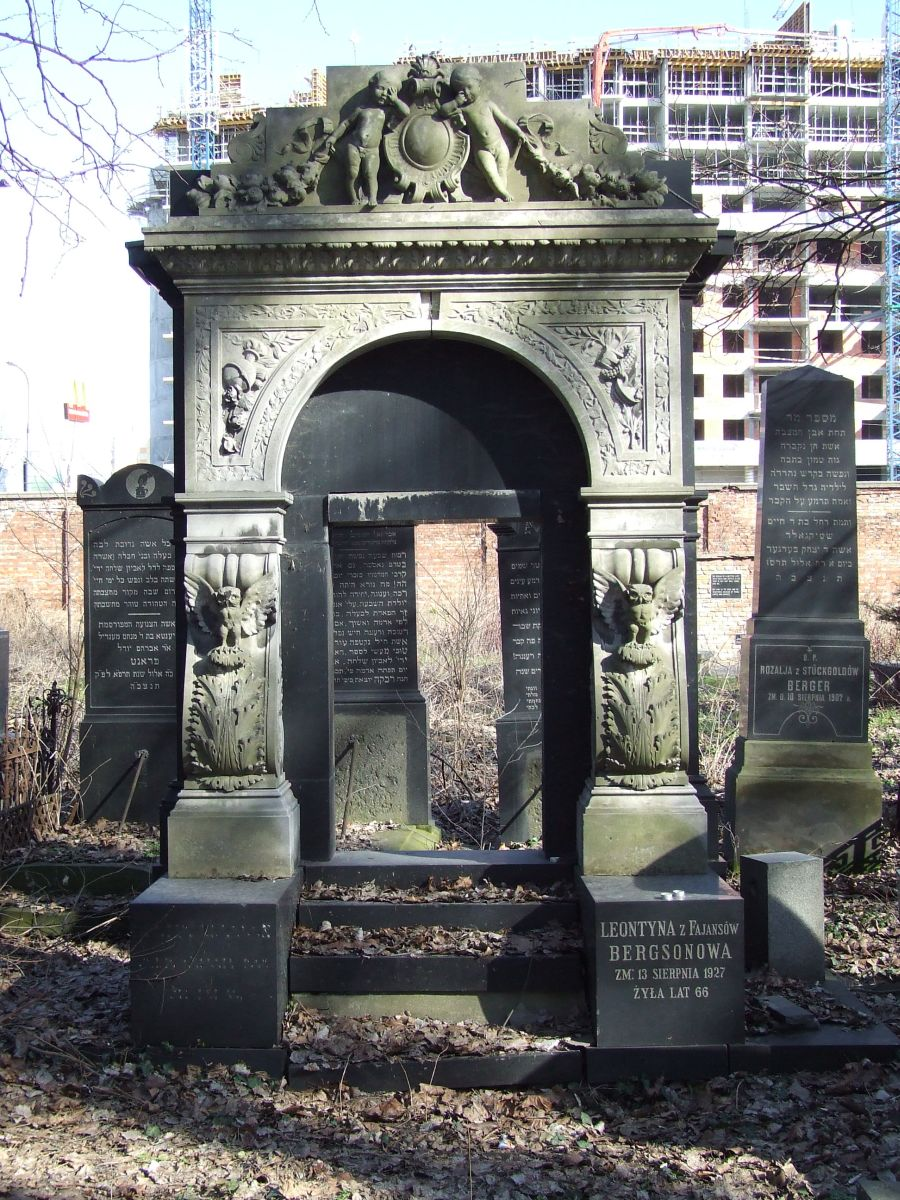 Nagrobek